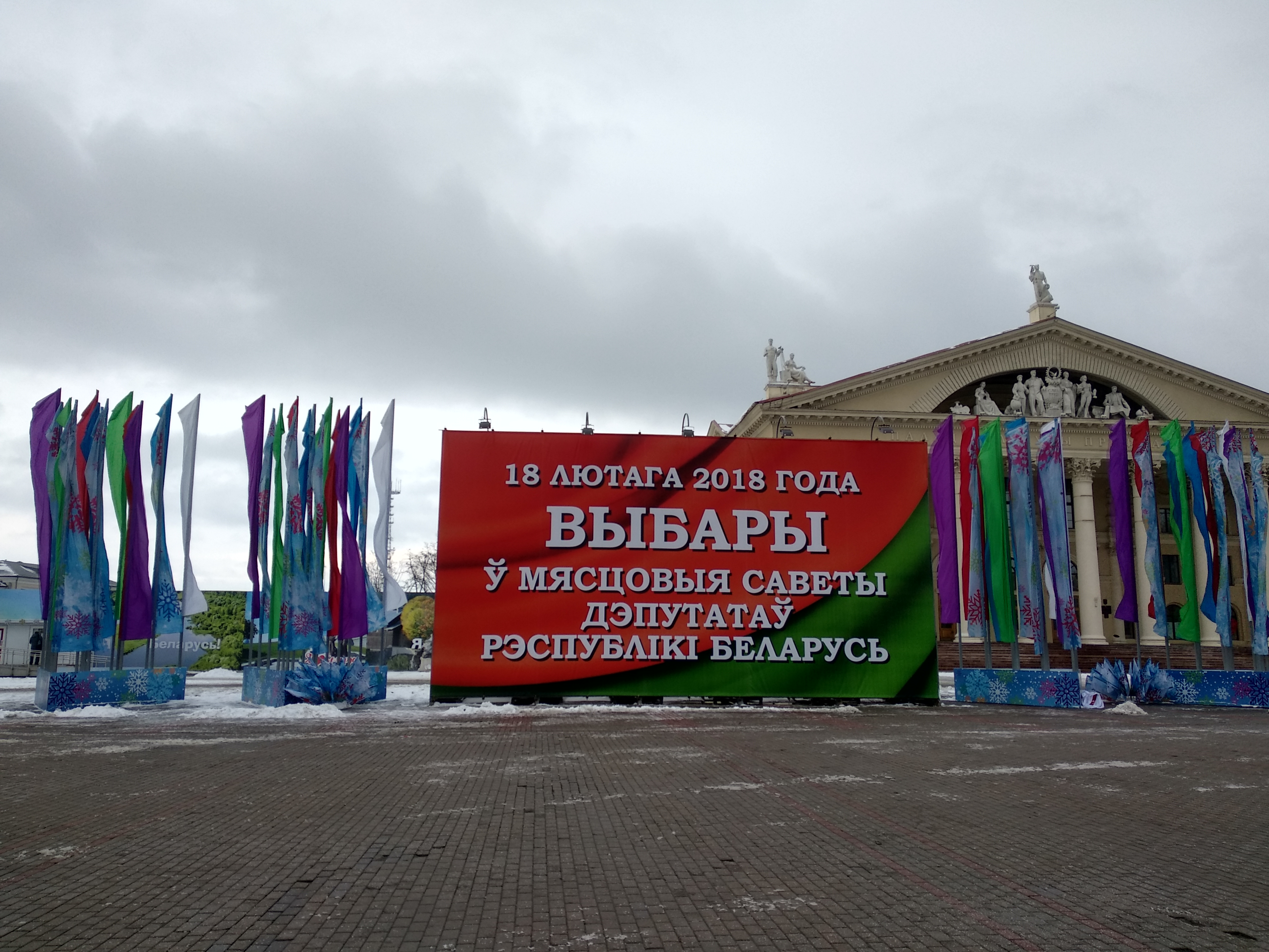 local elections